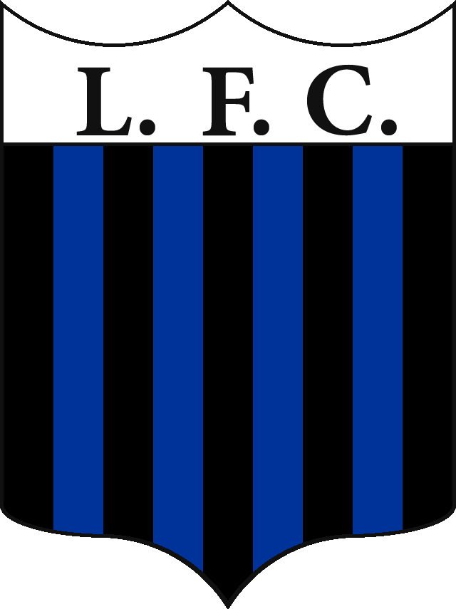 Actual escudo del Liverpool Fútbol Club